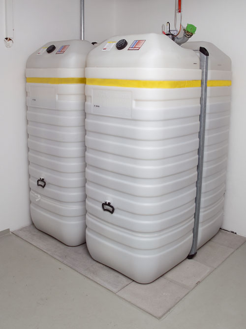 Doppelwandige Batterietanks mit schwefelarmem Heizöl